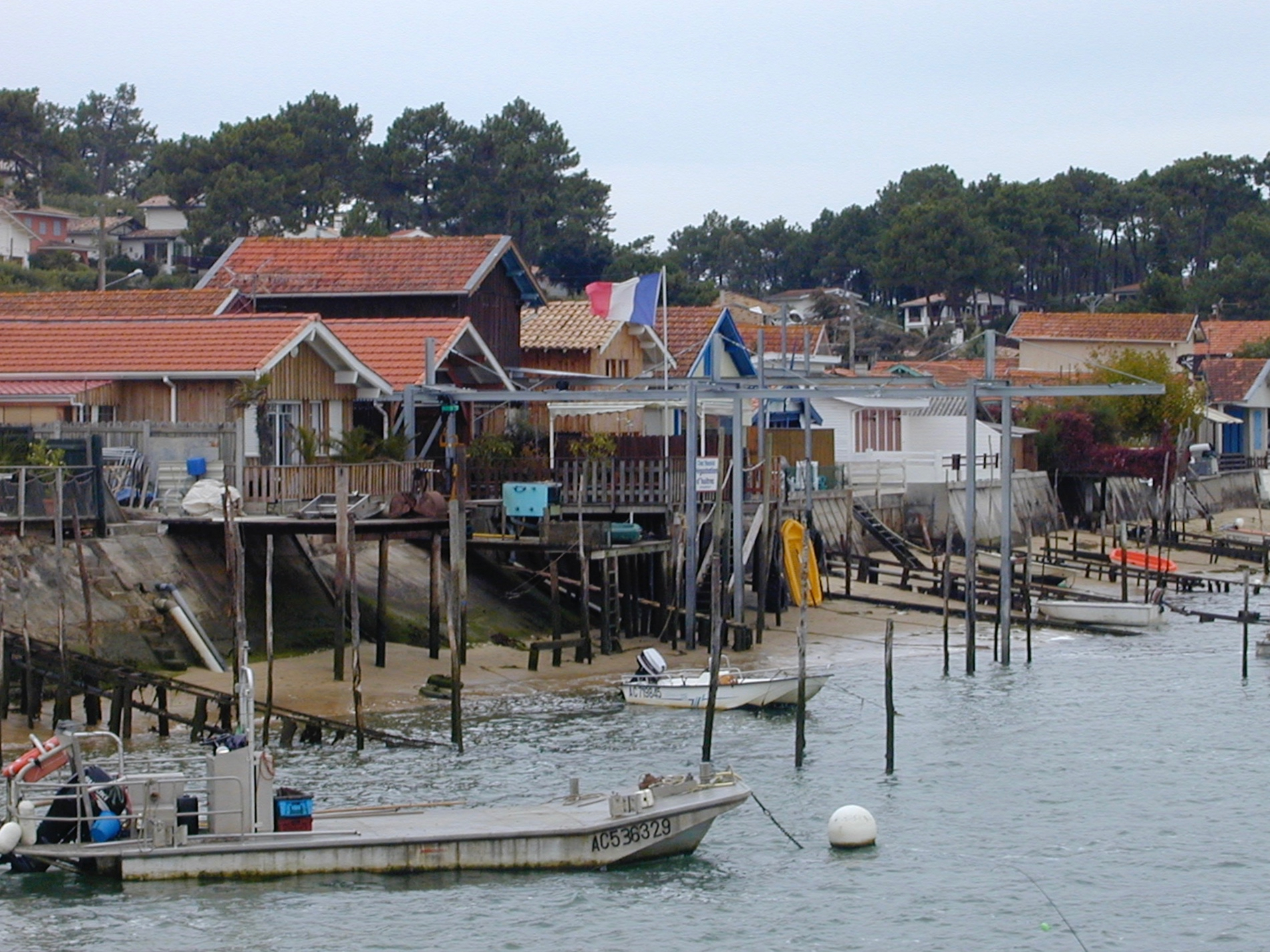 Le village ostréicole du Canon, Presqu'île du Cap Ferret (Gironde, Aquitaine, France).